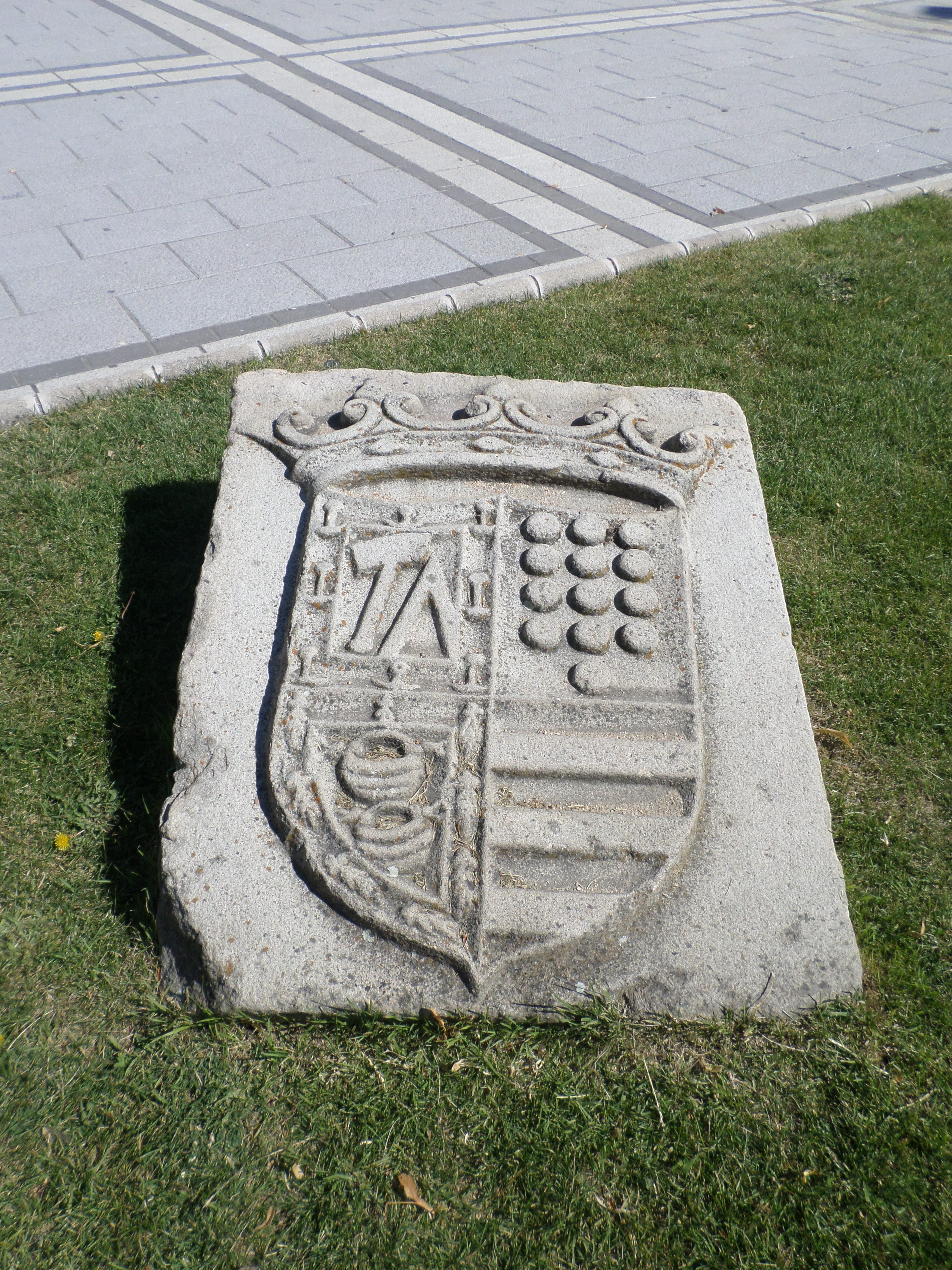 Este escudo se encuentra actualmente en el Parque de La Huerta de Peñaranda de Bracamonte